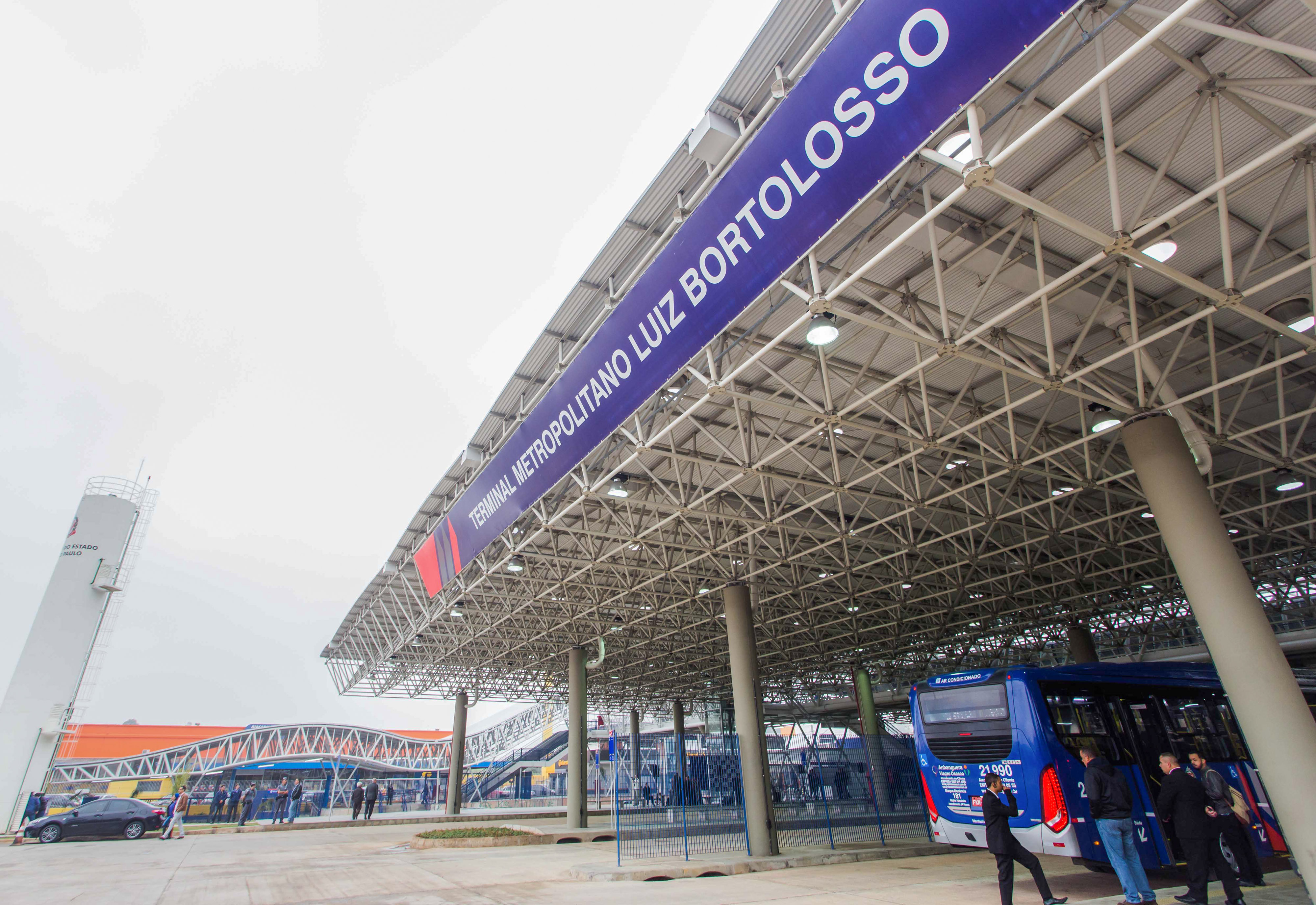 O Governador do Estado de São Paulo, Geraldo Alckmin, participou da Inauguração do Terminal da EMTU (Km 21) + Publicação do Edital de 2 licitações para o corredor Oeste. Local: Osasco/SP. Data: 16/08/2017. Foto: Alexandre Carvalho/A2img